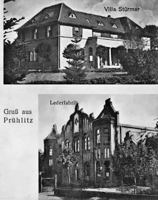 Lederfabrik Stürmer und Villa Stürmer in Prühlitz, jetzt Zahhna-Elster, Stadtteil Mühlanger, Postkartenabbildung 1920er Jahre